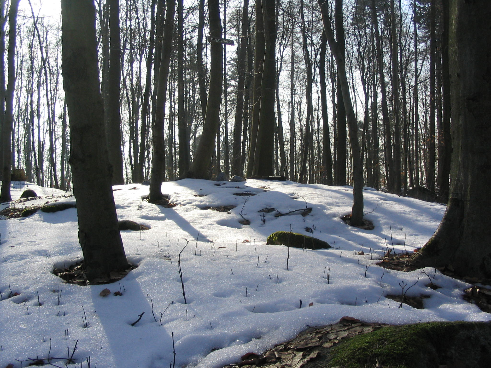 Hügelgrab Juhöhe, Mörlenbach (Odenwald)